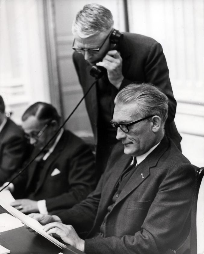 Minister B. Roolvink tijdens een debat over loonnota in de Tweede Kamer. Achter hem staat Minister de Block te telefoneren. Nederland, Den Haag, 28 mei 1968.